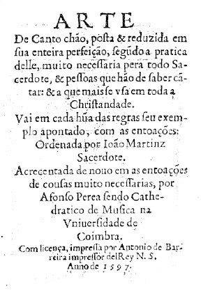 Livro de cantochão de Juan Martínez, traduzido para português e ampliado por Afonso Perea Bernal. 2.ª edição. Exemplar da Biblioteca Pública de Évora.